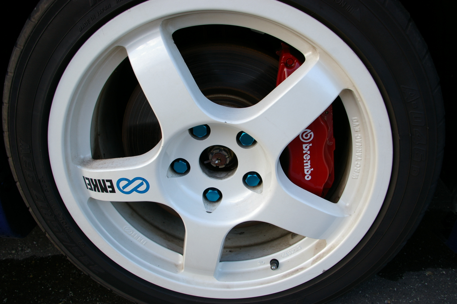 Brembo & ENKEI TarmacEVO.